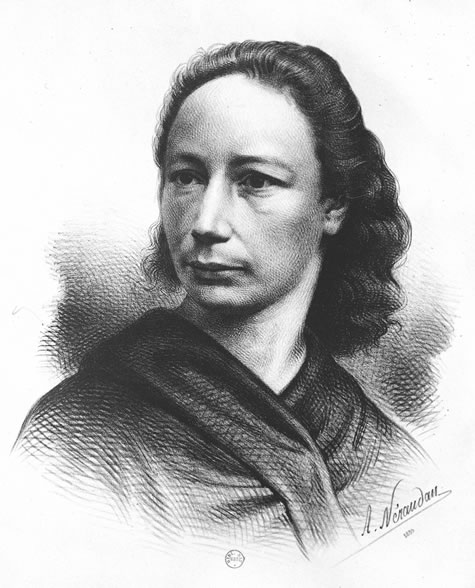 Gravure représentant Louise Michel.